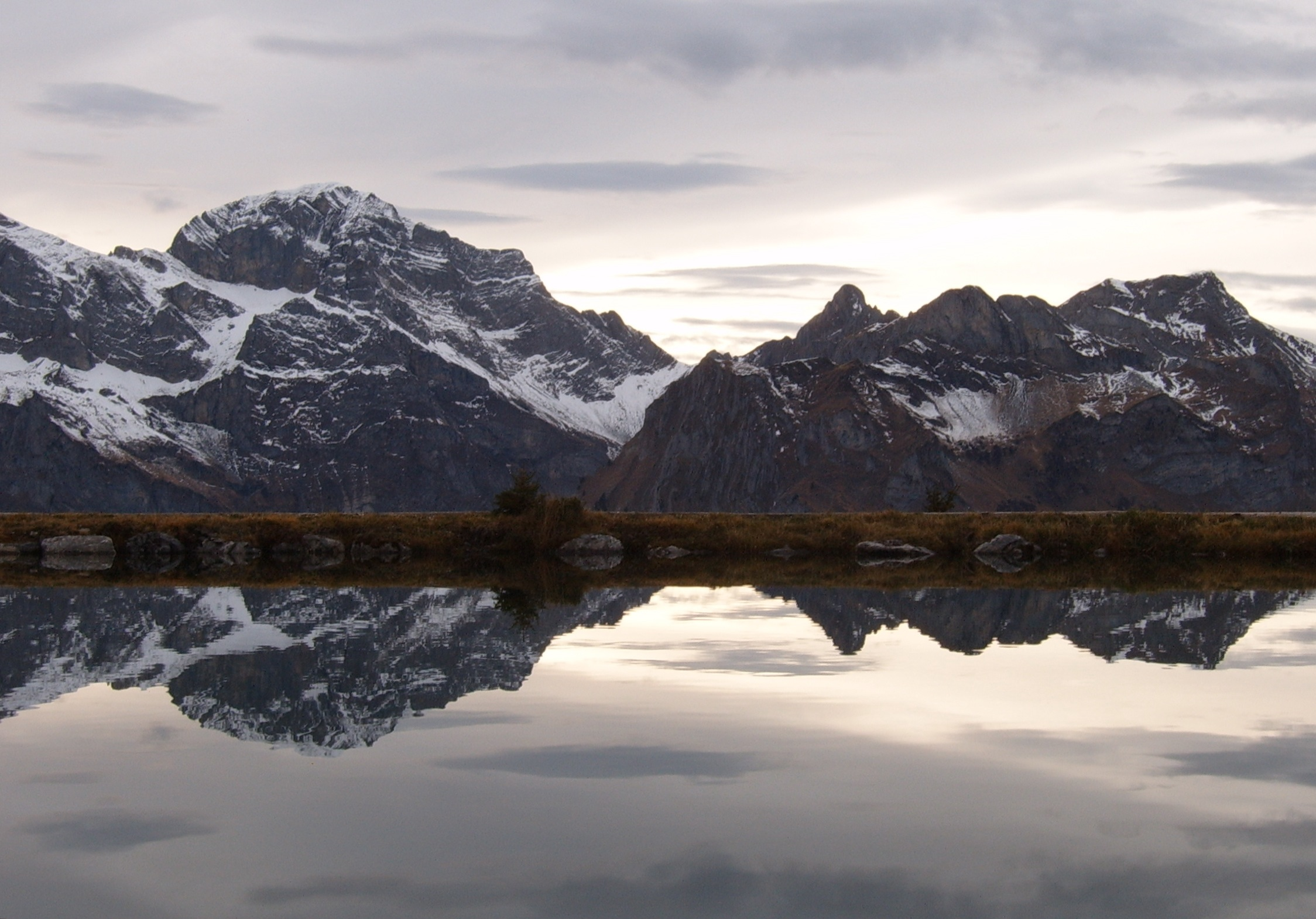 Härzlisee (1860 m), Brunni/Engelberg (Canton of Obwalden, Switzerland)